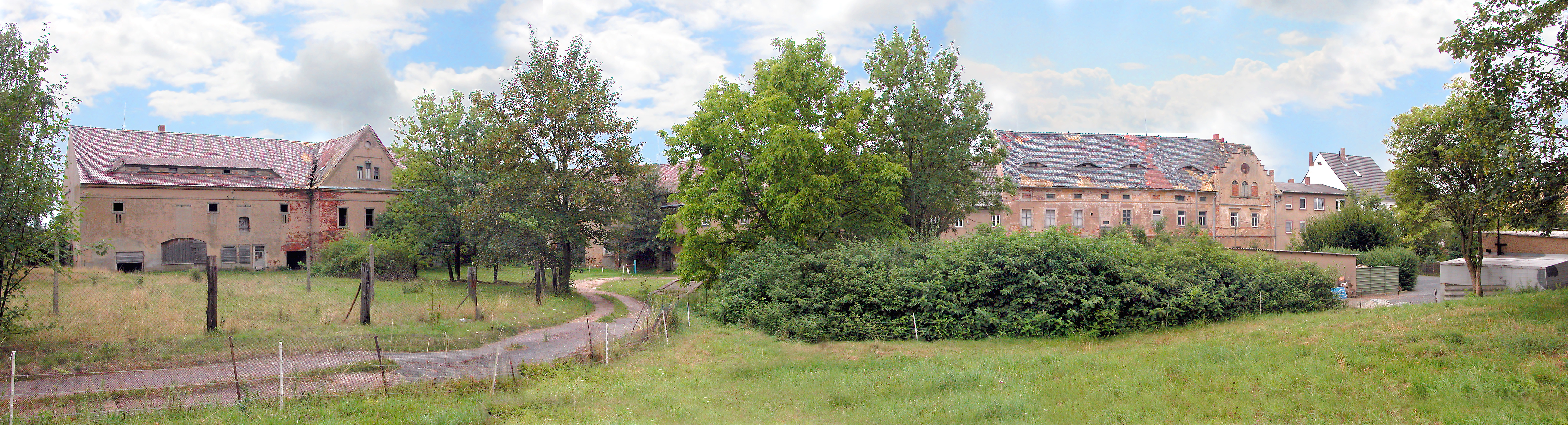 10.08.2006 04720 Döschütz (Großweitzschen): Rittergut, rechts das Herrenhaus. [DSCN11041-11044.TIF]20060810025MDR.JPG(c)Blobelt